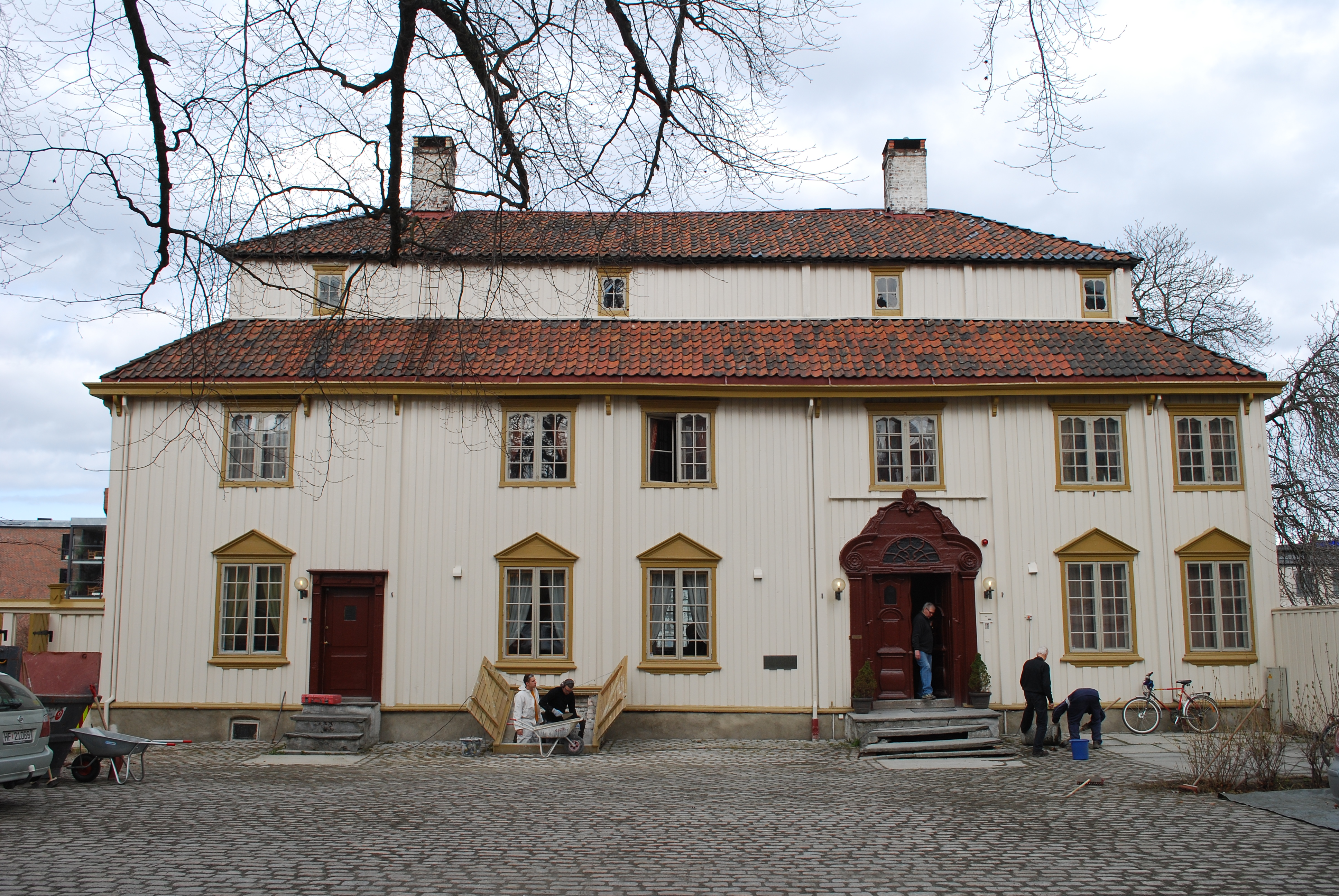 Bakke gård ved Møllenberg i Trondheim